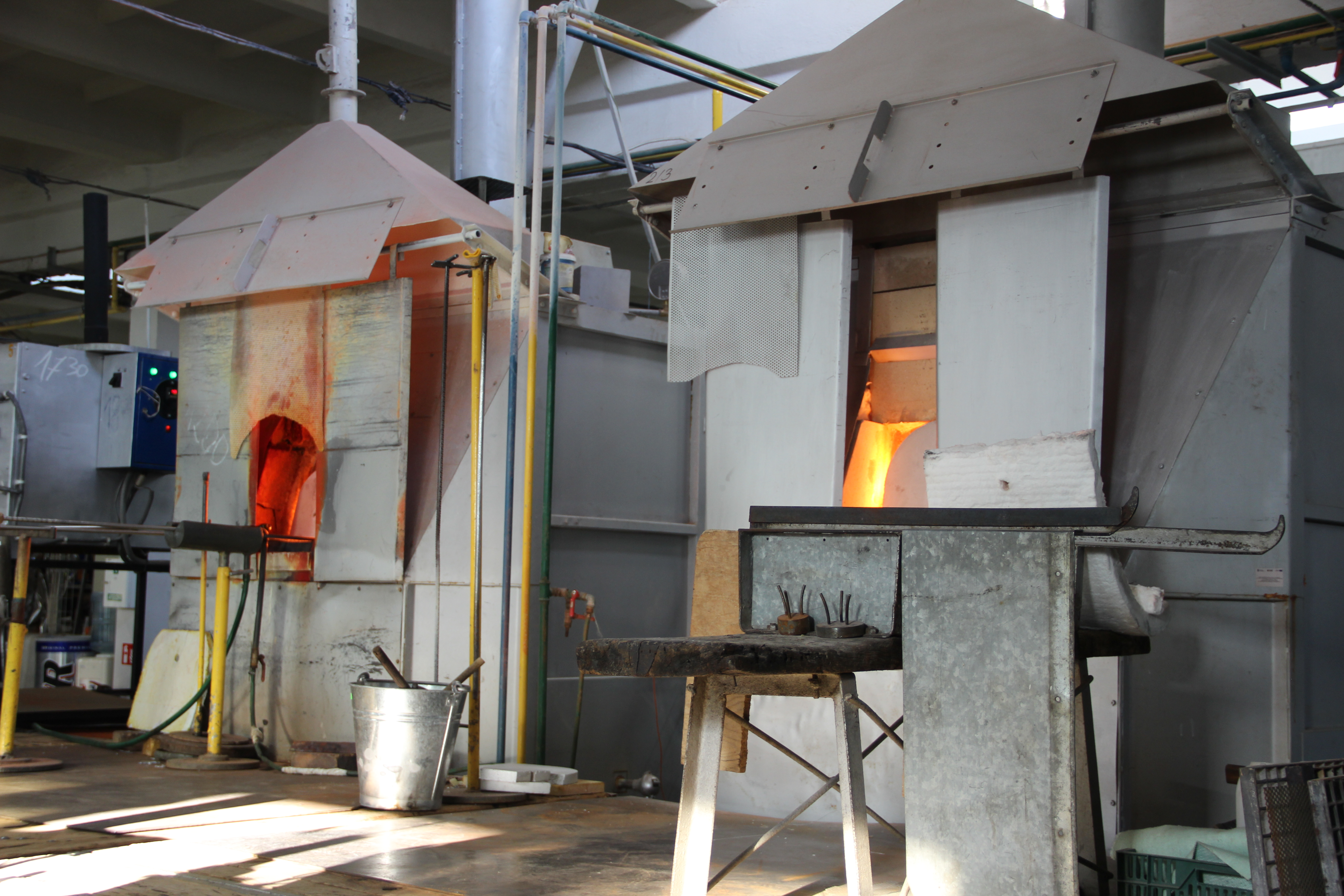 Piechowice, Huta Julia - piece hutnicz